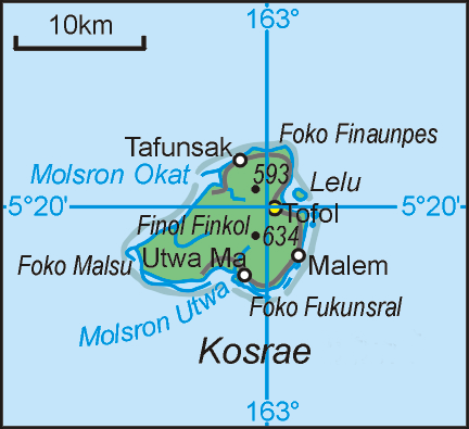 Kosrae saar